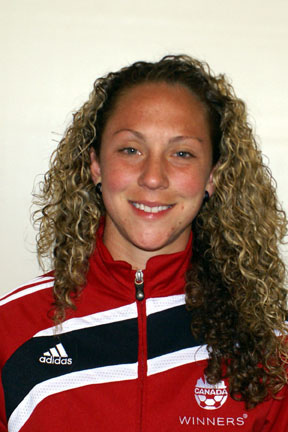 Moscato_Carmelina2009www